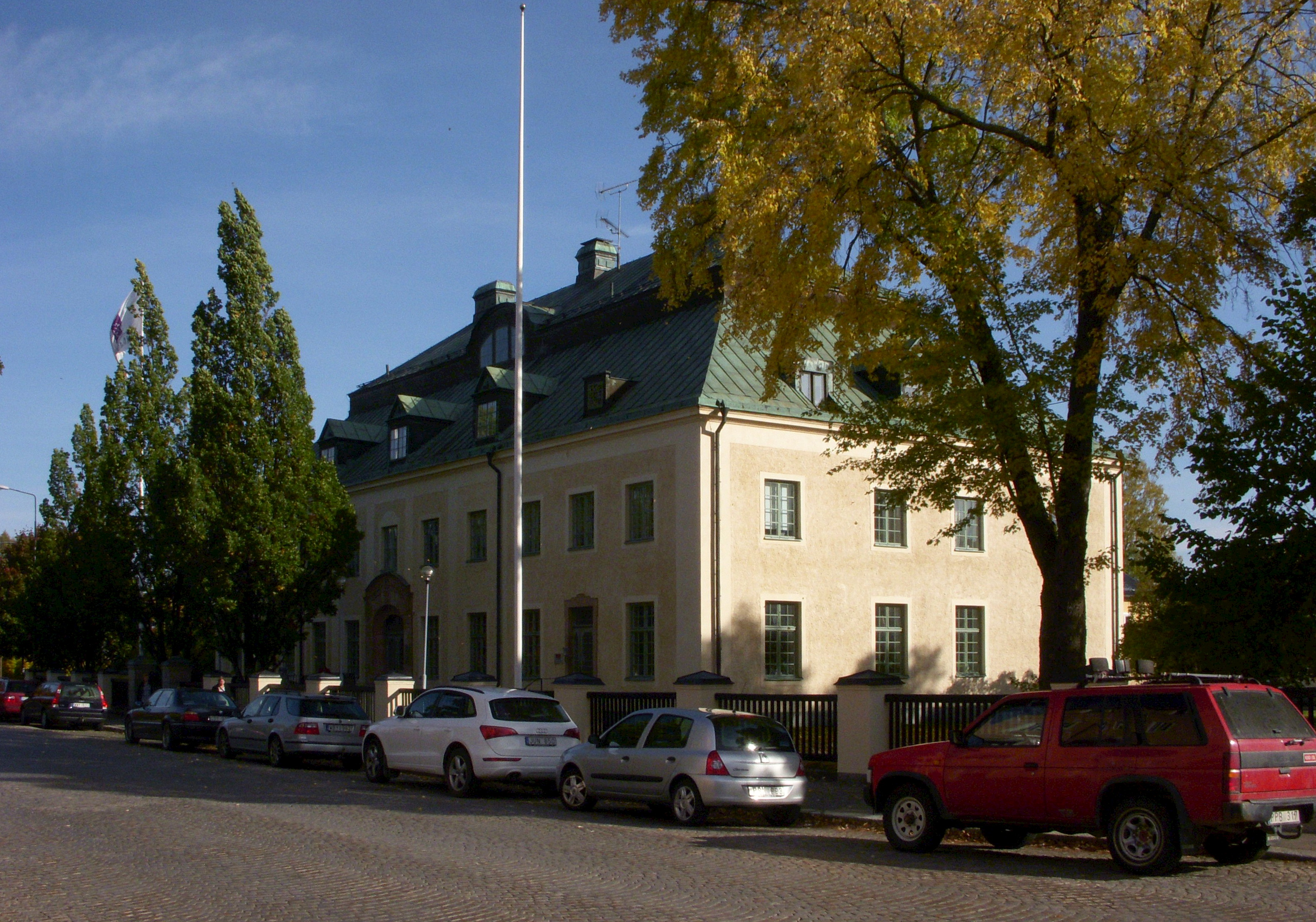 Ludvika tingsrätt